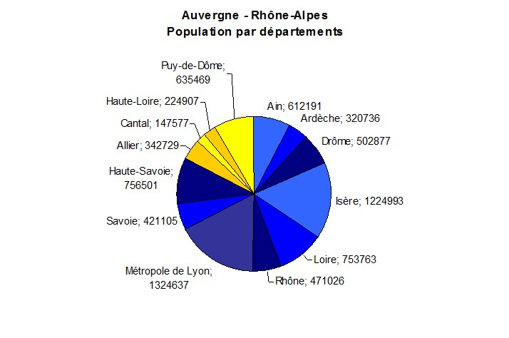 Population par départements de la région Auvergne - Rhône-Alpes en 2015 (source Wikipédia)